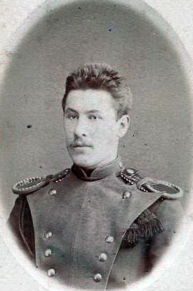 Александр Фёдорович Грушецкий, р. 17 октябрь 1854. В чине корнета. Из архива Е.С. Меленевской. Фото приблизительно 1877}Выпущен корнетом (ст. 06.07.1877) в 1-й уланский Санкт-Петербургский полк. Исправить на 1877 г. Е. С. Меленевская.